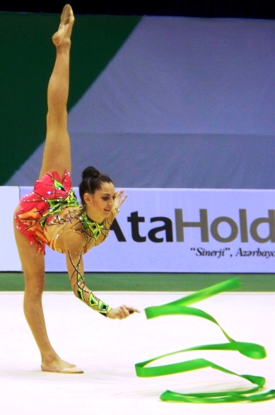 Анна Курбанова (Азербайджан)